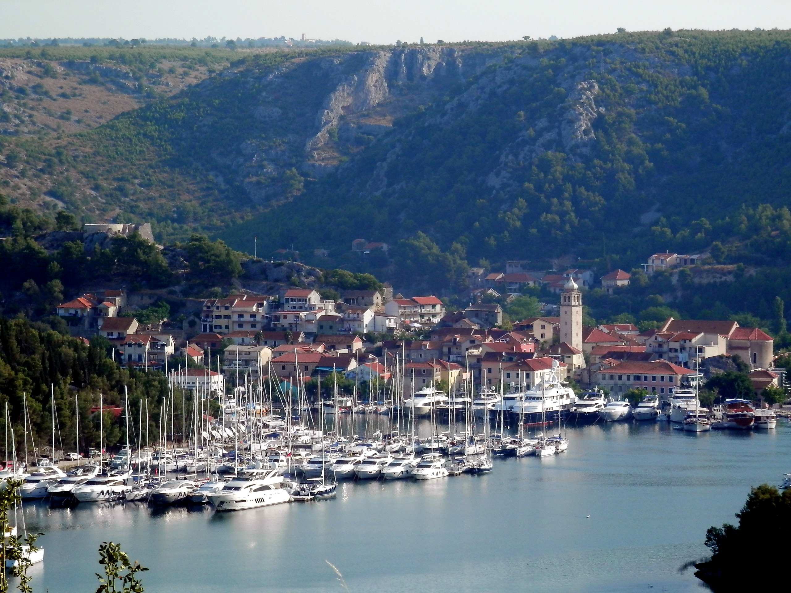 Chorvátsko. Prokljansko jezero pri meste Skradin. Pohľad z diaľničného odpočívadla Krka.Leto 2013.